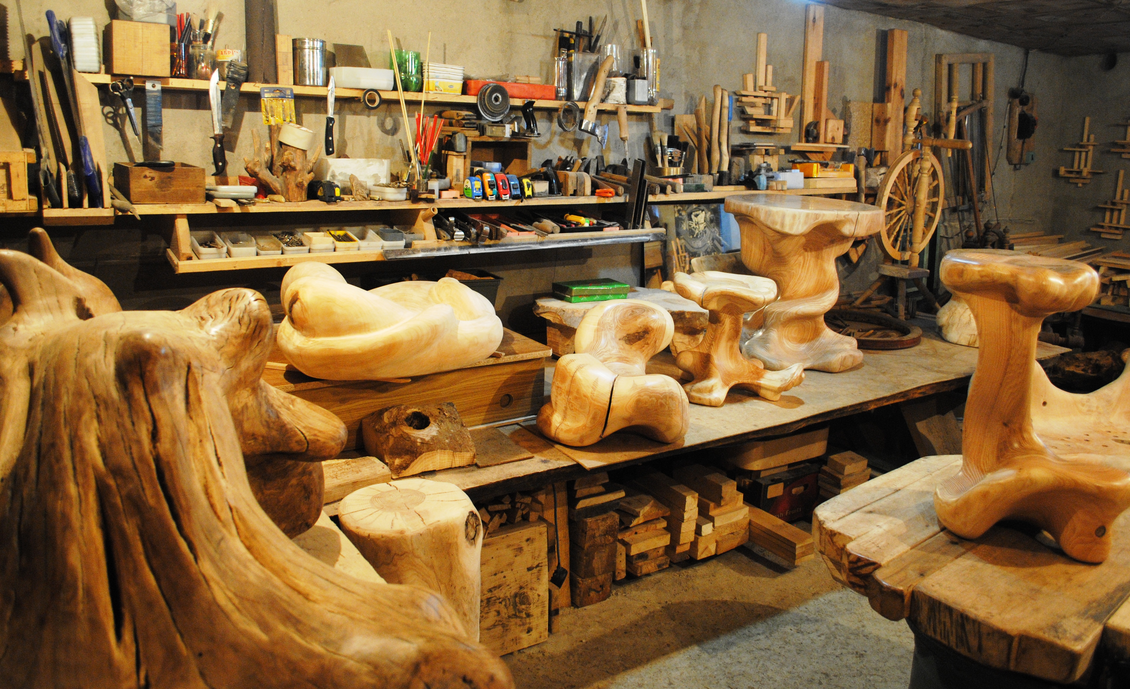 художник Раскат